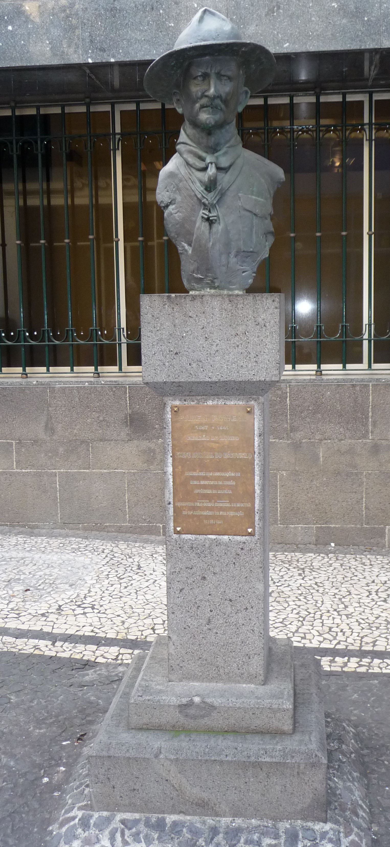 Robert Baden-Powell, a cserkészet megalapítója (Funchal, Madeira)